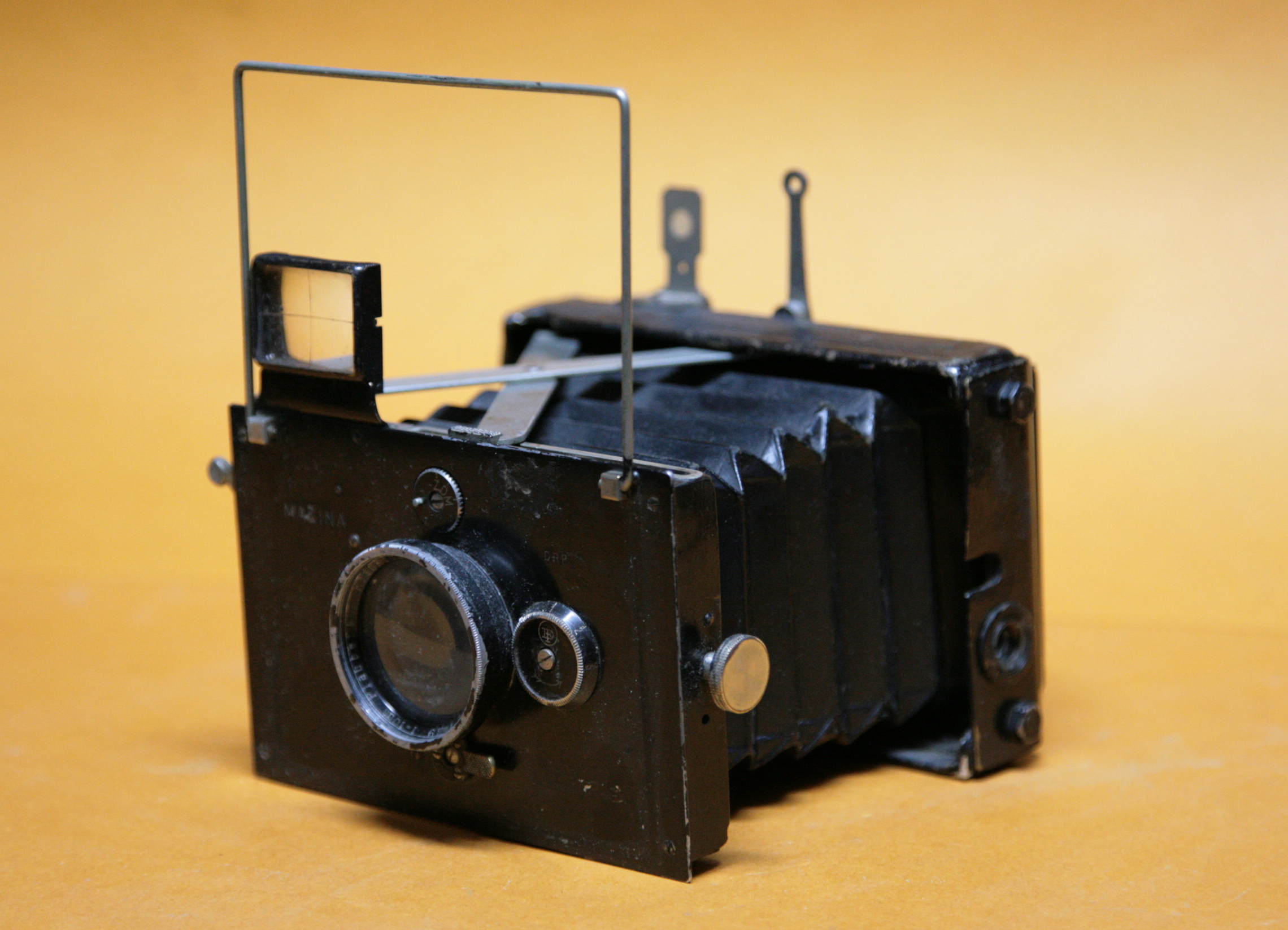 Plaubel Makina 1912 6x4.5cm film plates, Plaubel Anticomar - with a focal length of 7.5cm and available with f/4.2, f/3 or f/2.8 as maximum aperture, mounted on a central Compur dial-set shutter